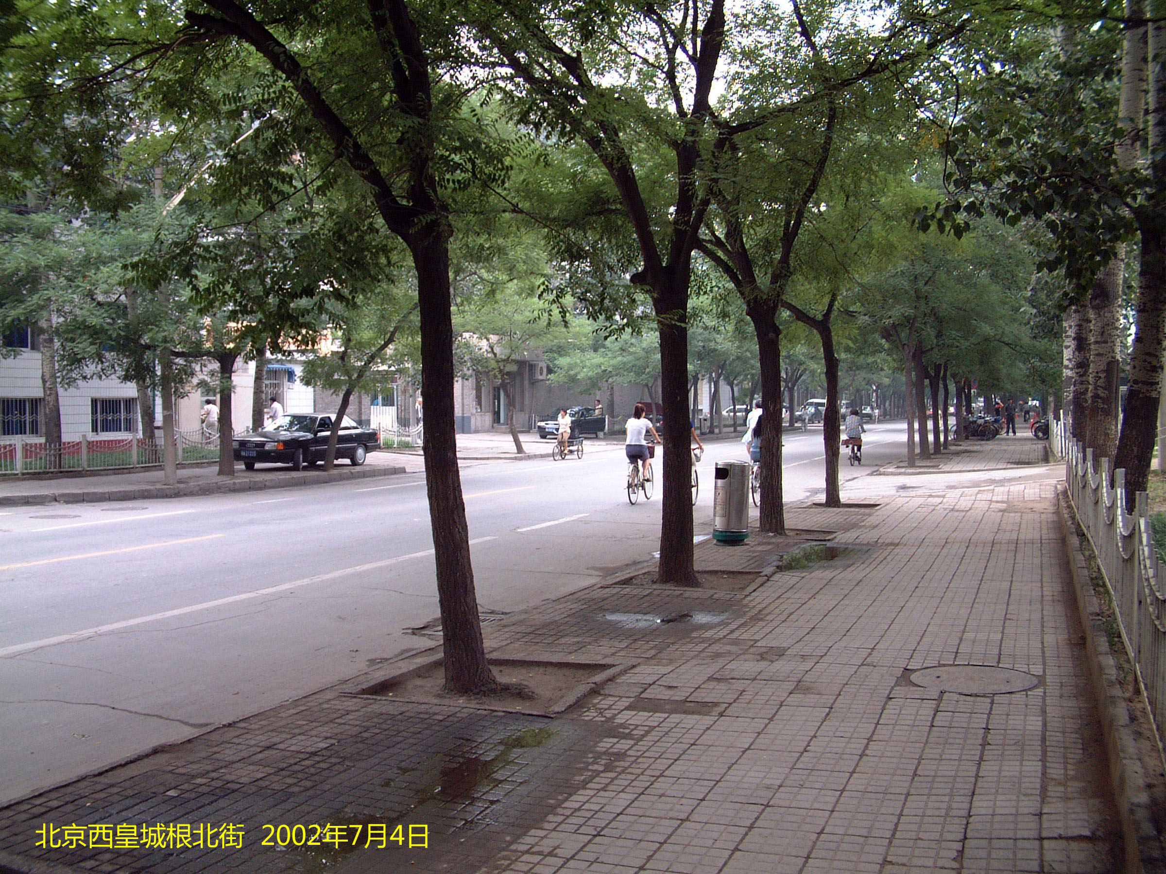 2002年 北京西皇城根北街（后库、毛家湾）